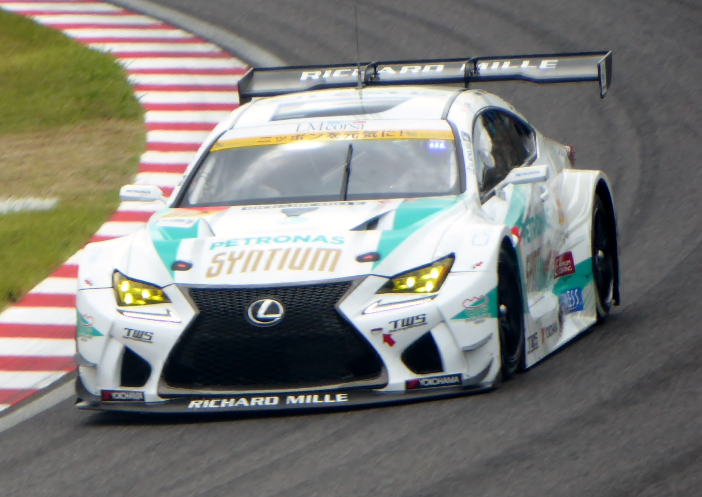 2016年鈴鹿1000㎞における60号車SYNTIUM LMcorsa RC F GT3を撮影。